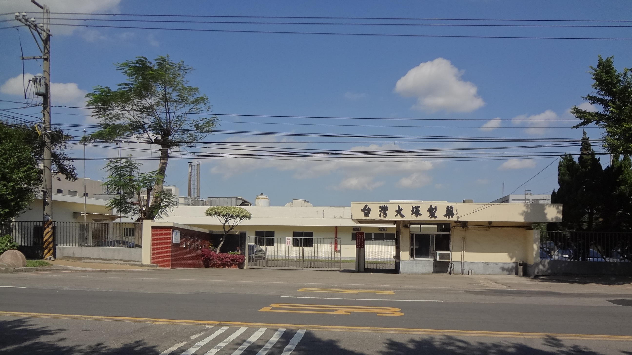 台灣大塚製藥中壢廠，地址：桃園縣中壢市吉林路15號。